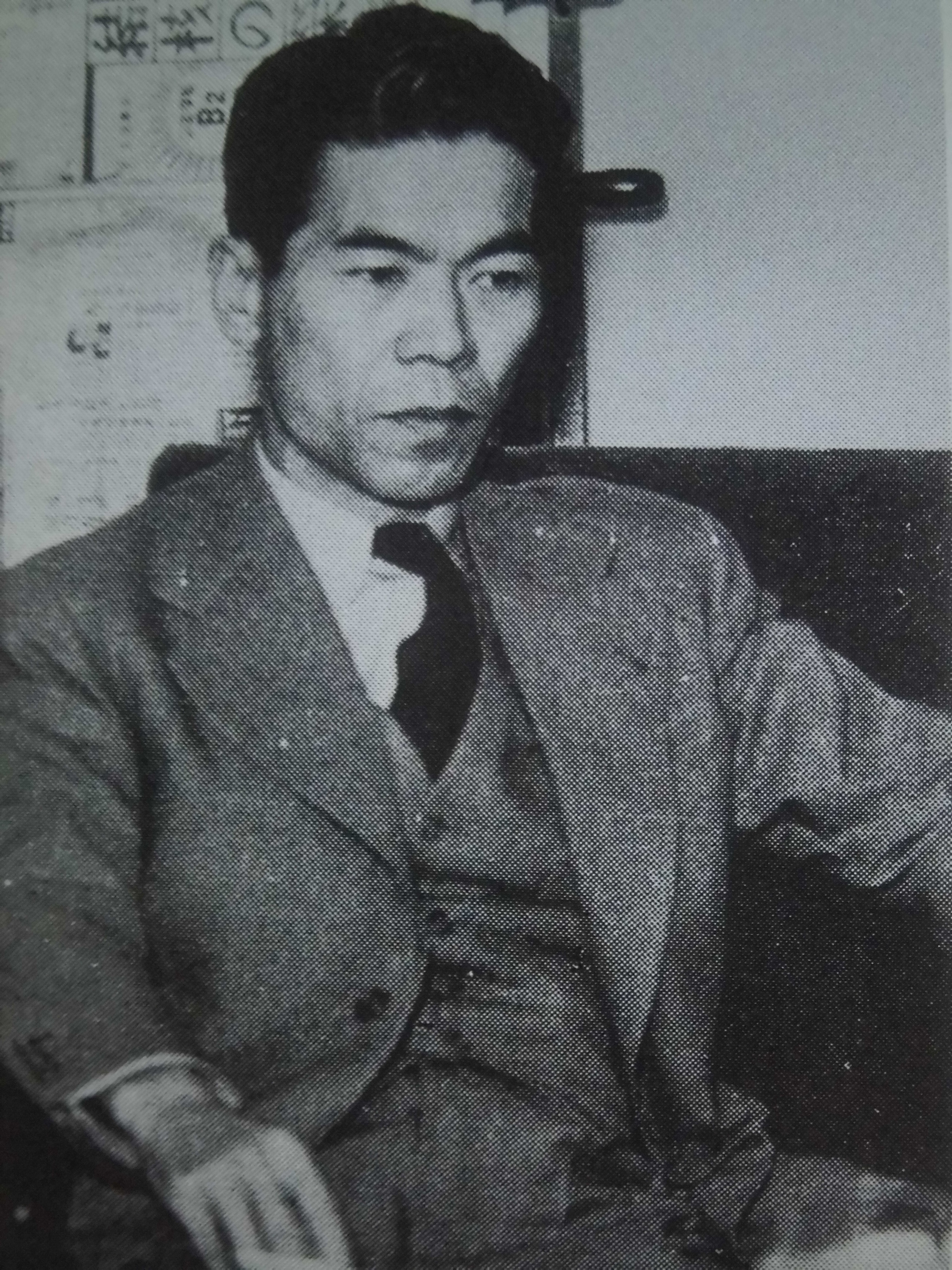 吉川英治（Yoshikawa Eiji）